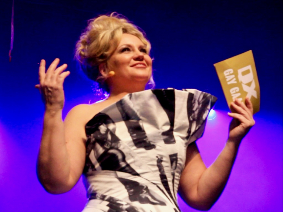 2015 QX Gay Gaalan juonsi Maria Sid. Finlaysonin Tom of Finland kankaasta tehdyn iltapuvun suunnitteli Mert Otsamo.